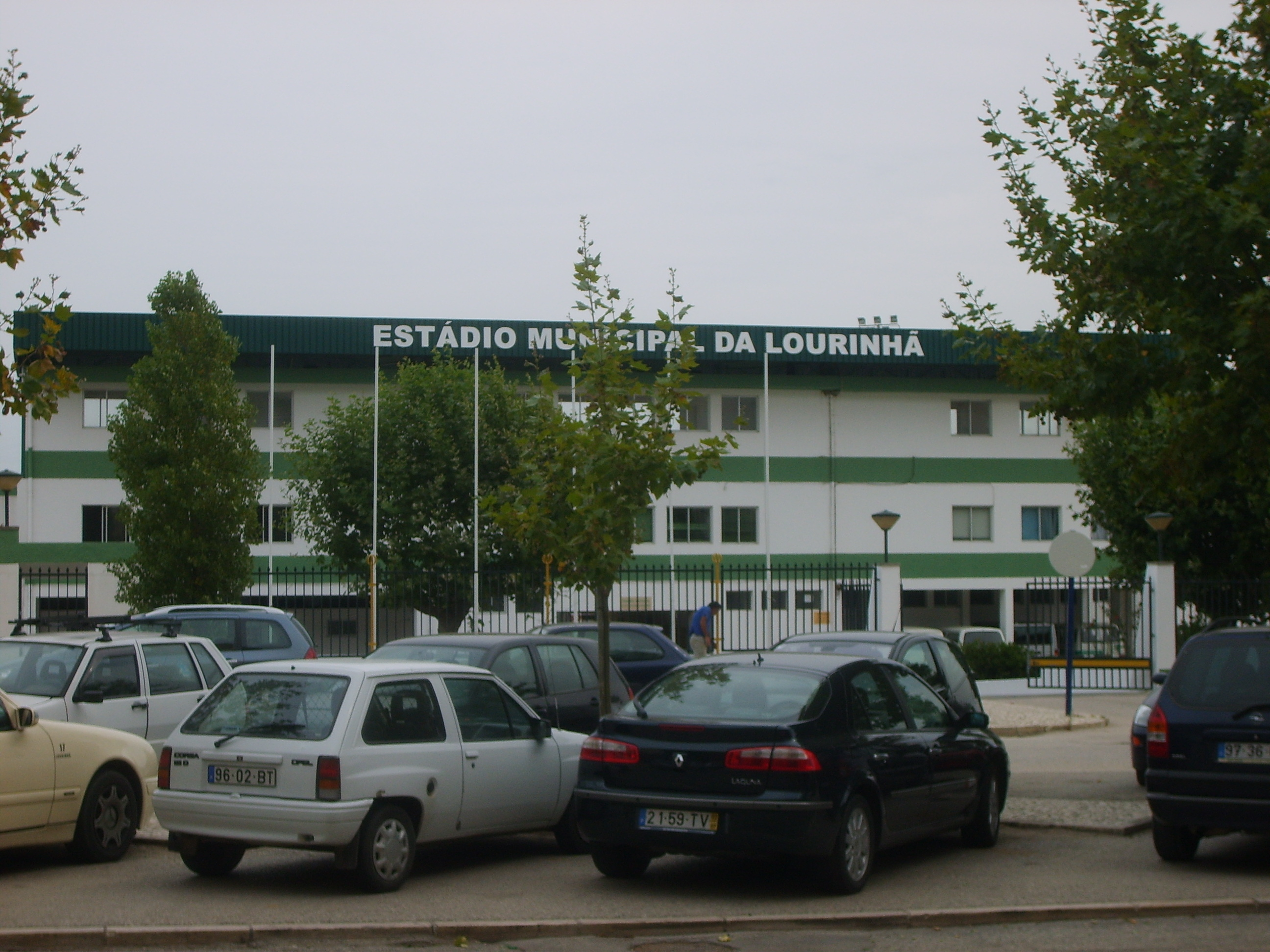 Estádio Municipal da Lourinhã